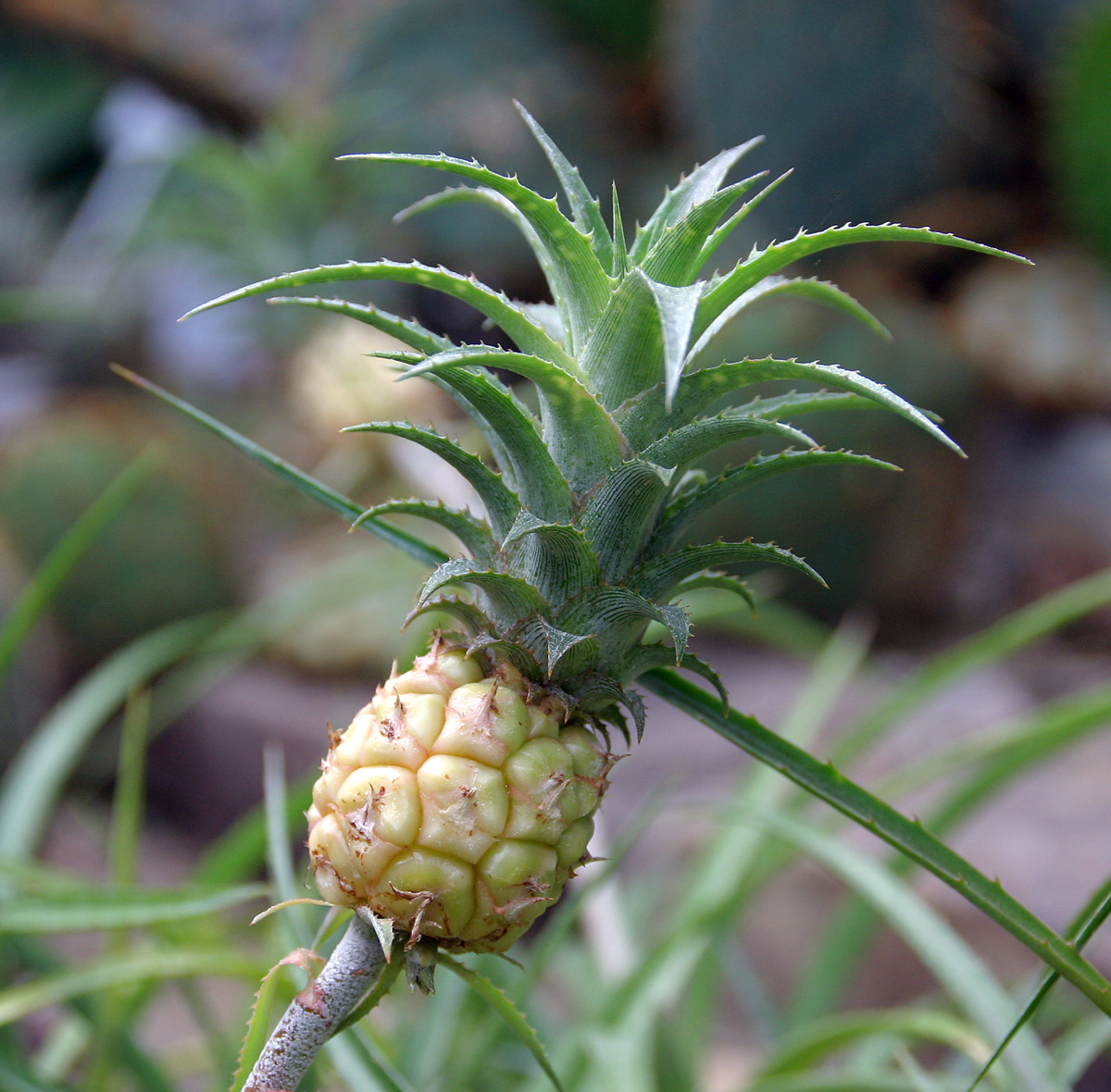 Ananas nanus (L.B.Sm)L.B.Sm - Botanical Garden, Bonn